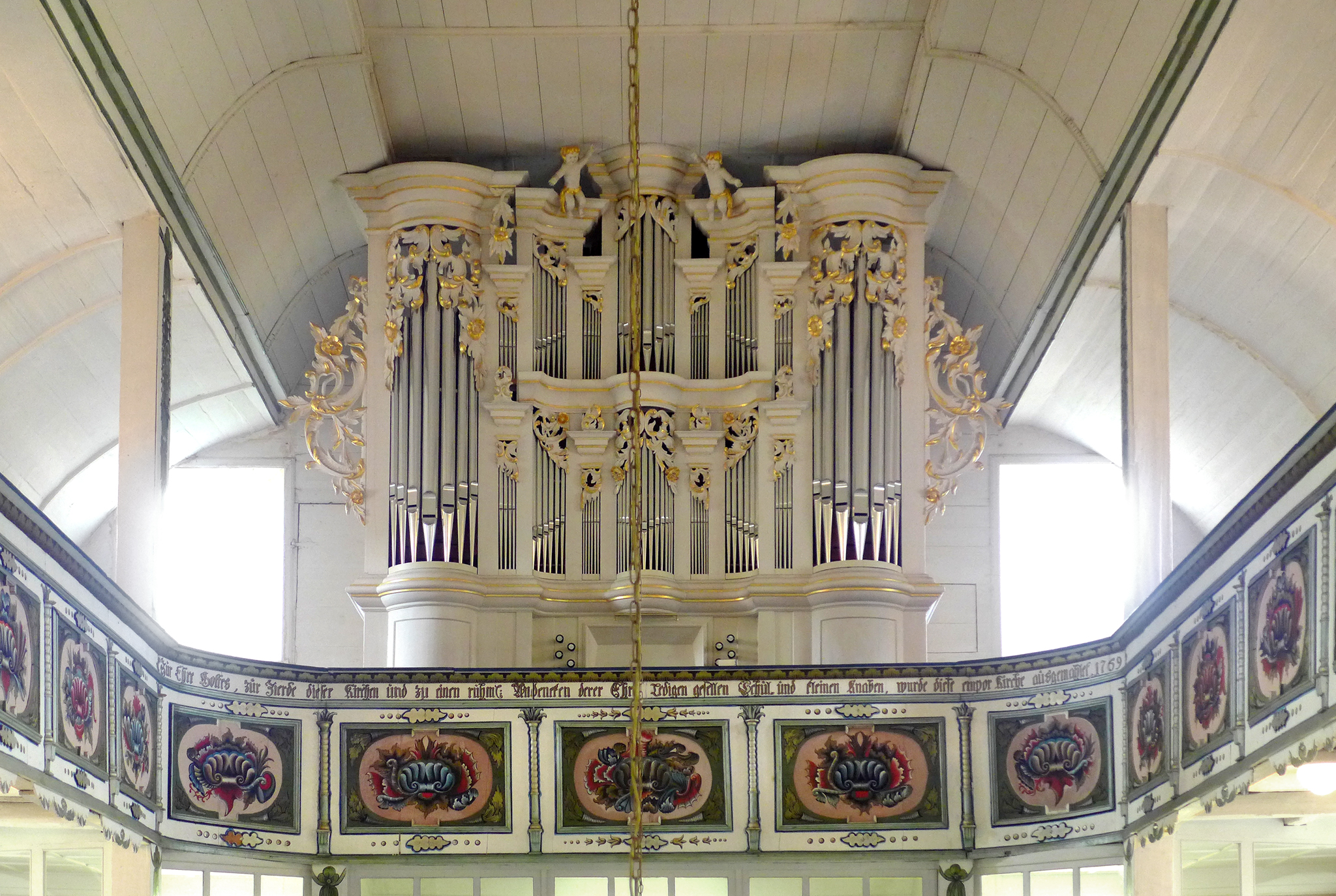 Johann-Daniel-Schulze-Orgel in der Kirche Ellichleben, restauriert und wieder geweiht am 20.6.2010